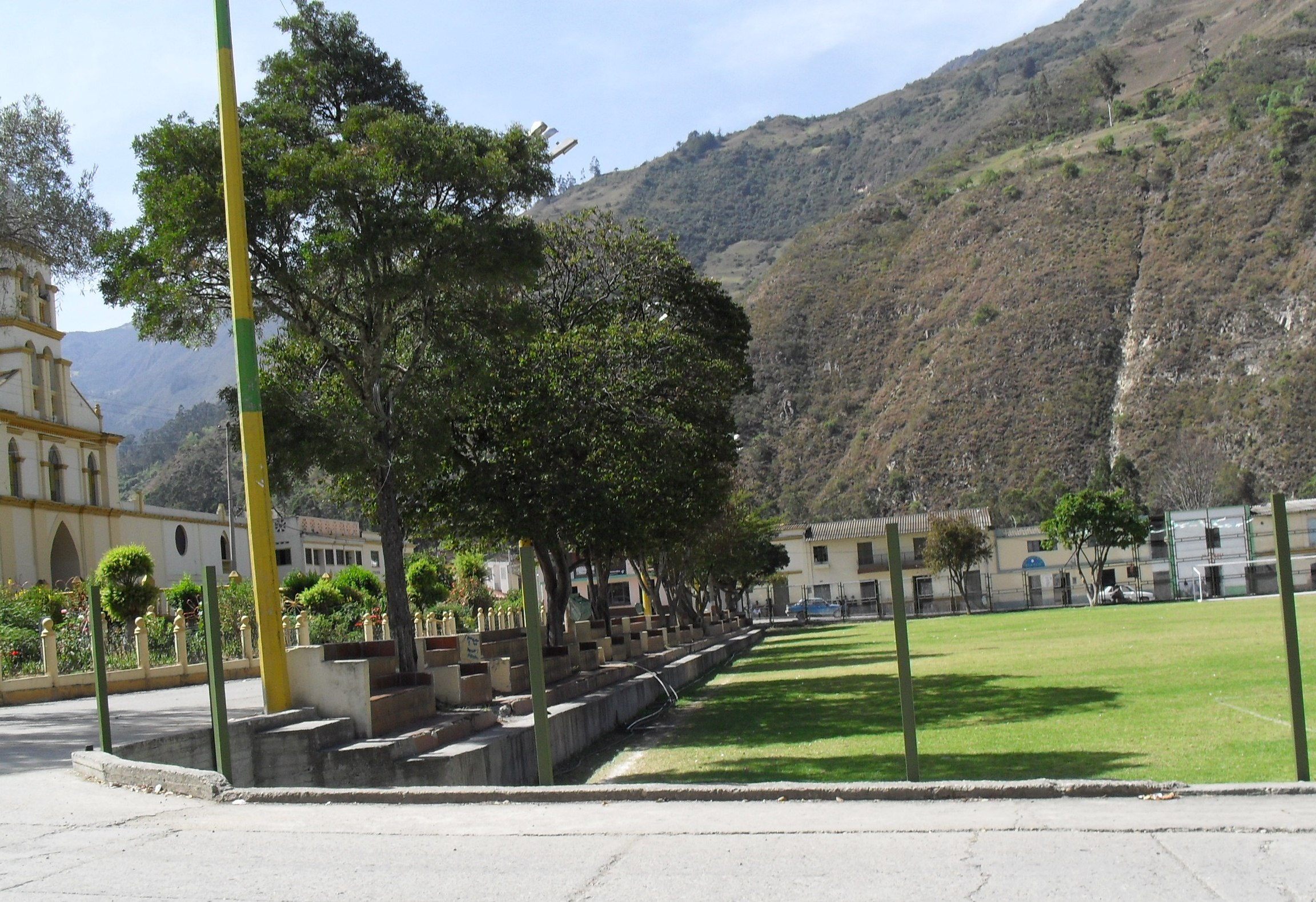 Parque principal del municipio de Panqueba, Boyacá, Colombia